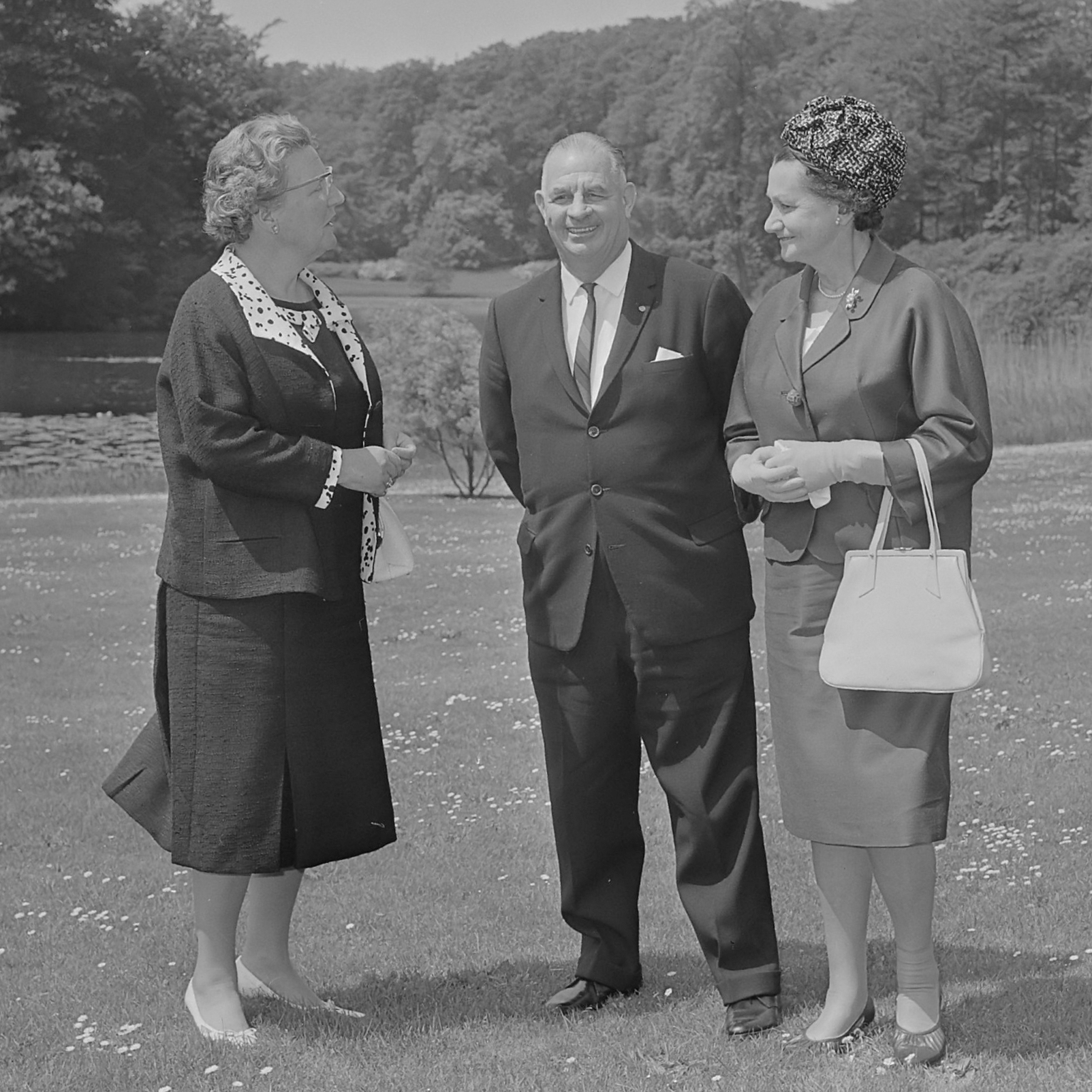 Koningin Juliana ontvangt de Australische minister van Transport en Immigratie Opperman op paleis Soestdijk. V.l.n.r. koningin Juliana, minister Opperman en zijn echtgenote in de paleistuin 2 juni 1965